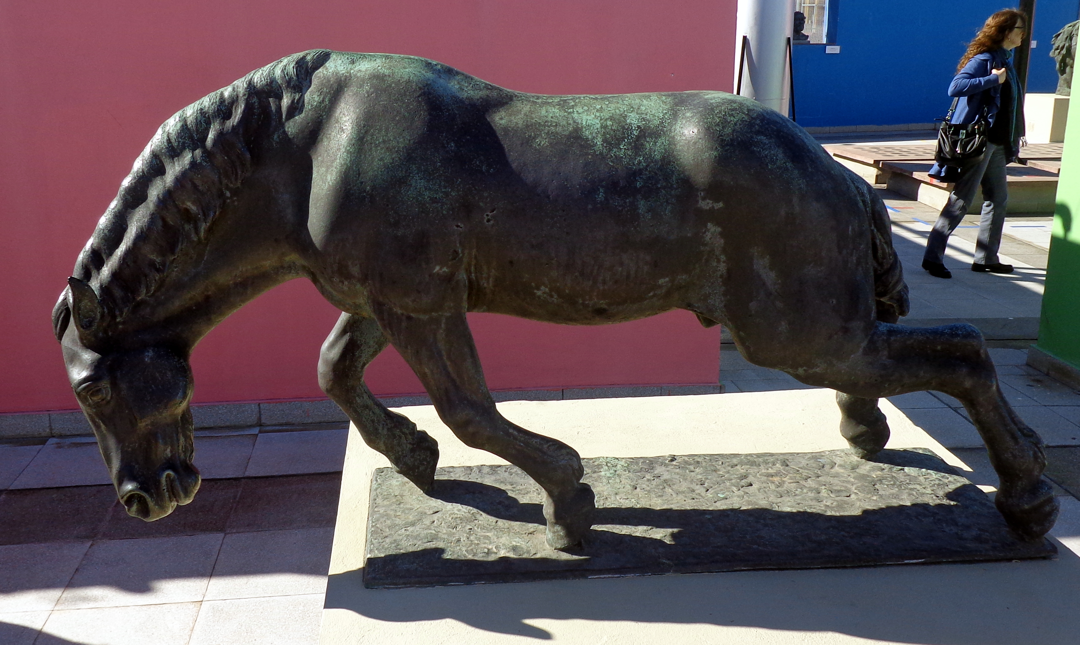 "Arrancando", de Emilio Jacinto Sarniguet, (c 1926). En Escuela Pedro de Mendoza, La Boca, Buenos Aires, Argentina.